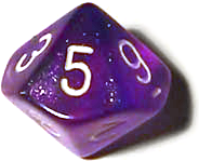 Verbesserte Version auf Grundlage von: Image:10-sided dice 250.jpg des Benutzers Benutzer:Fantasy